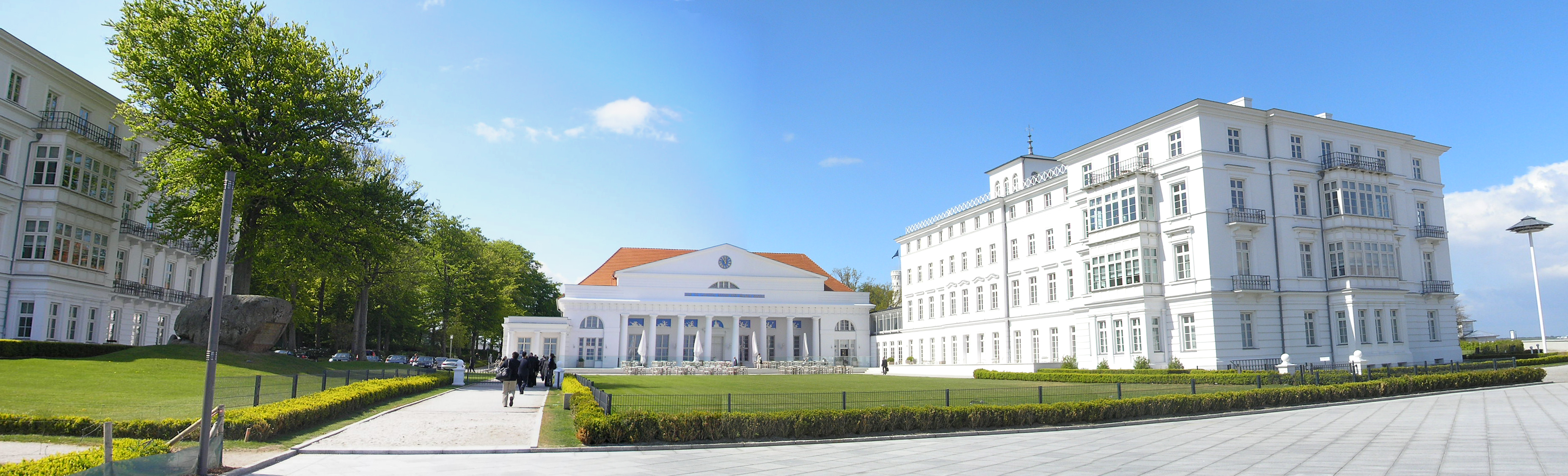 View of the Kurhaus in Heiligendamm.